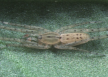 male Humua takeuchii from Okinawa.